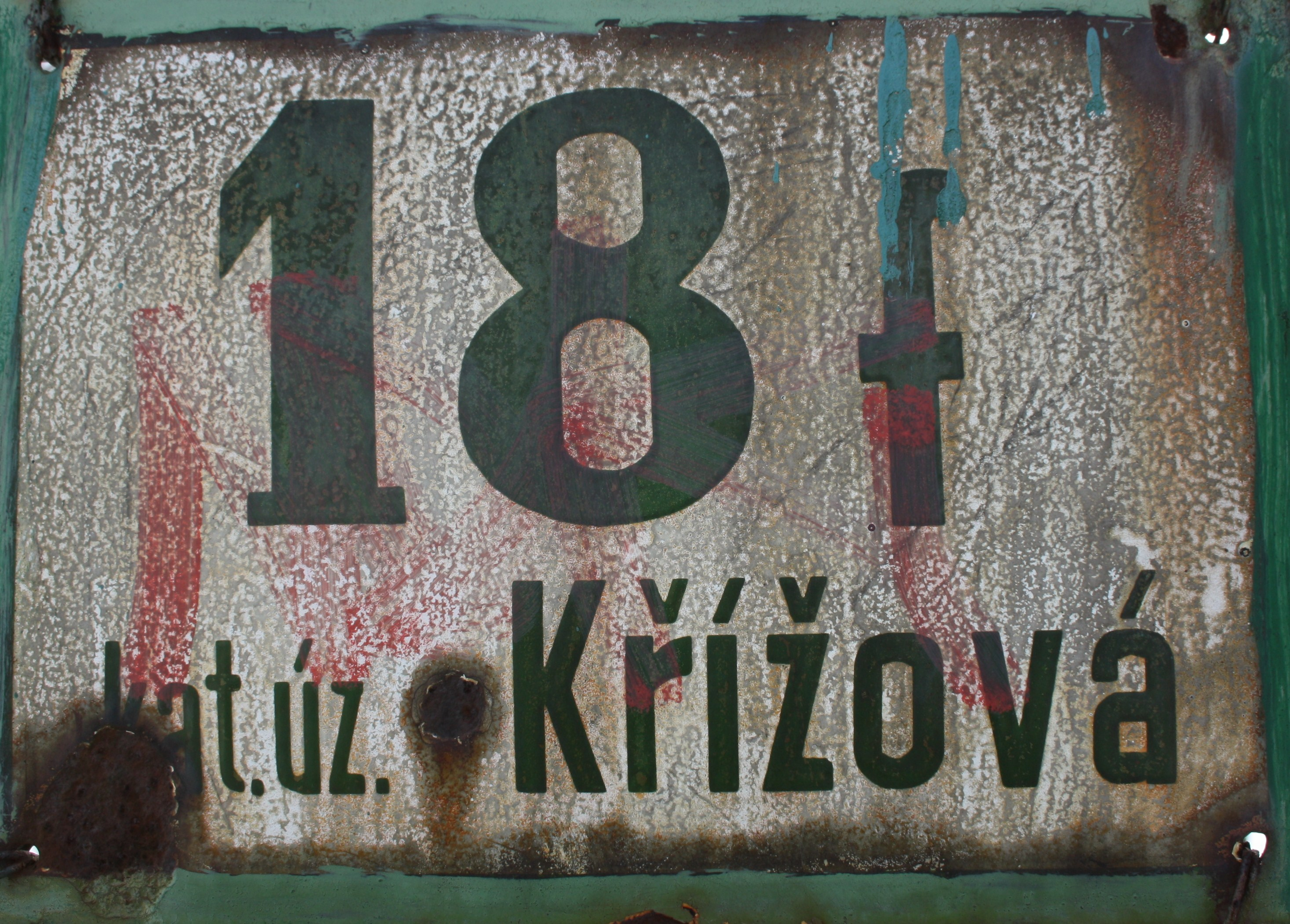 Tabulka s evidenčním číslem 18 zaniklého katastrálního území Křížová v Brně. Několik těchto tabulek se dodnes nachází na plotech zahrádek při ulici Rybkova